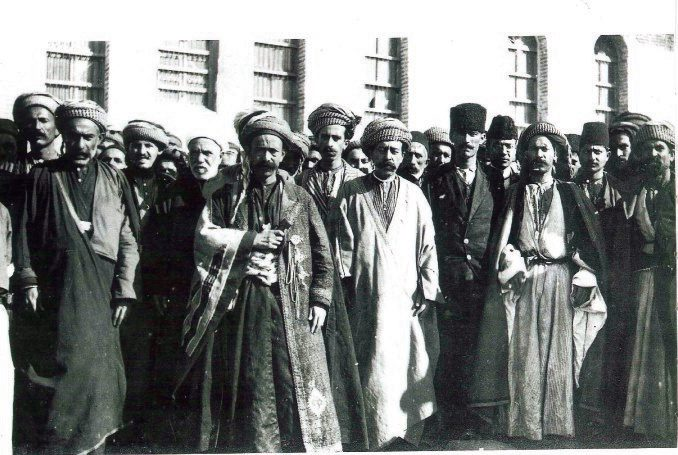 Kurdî